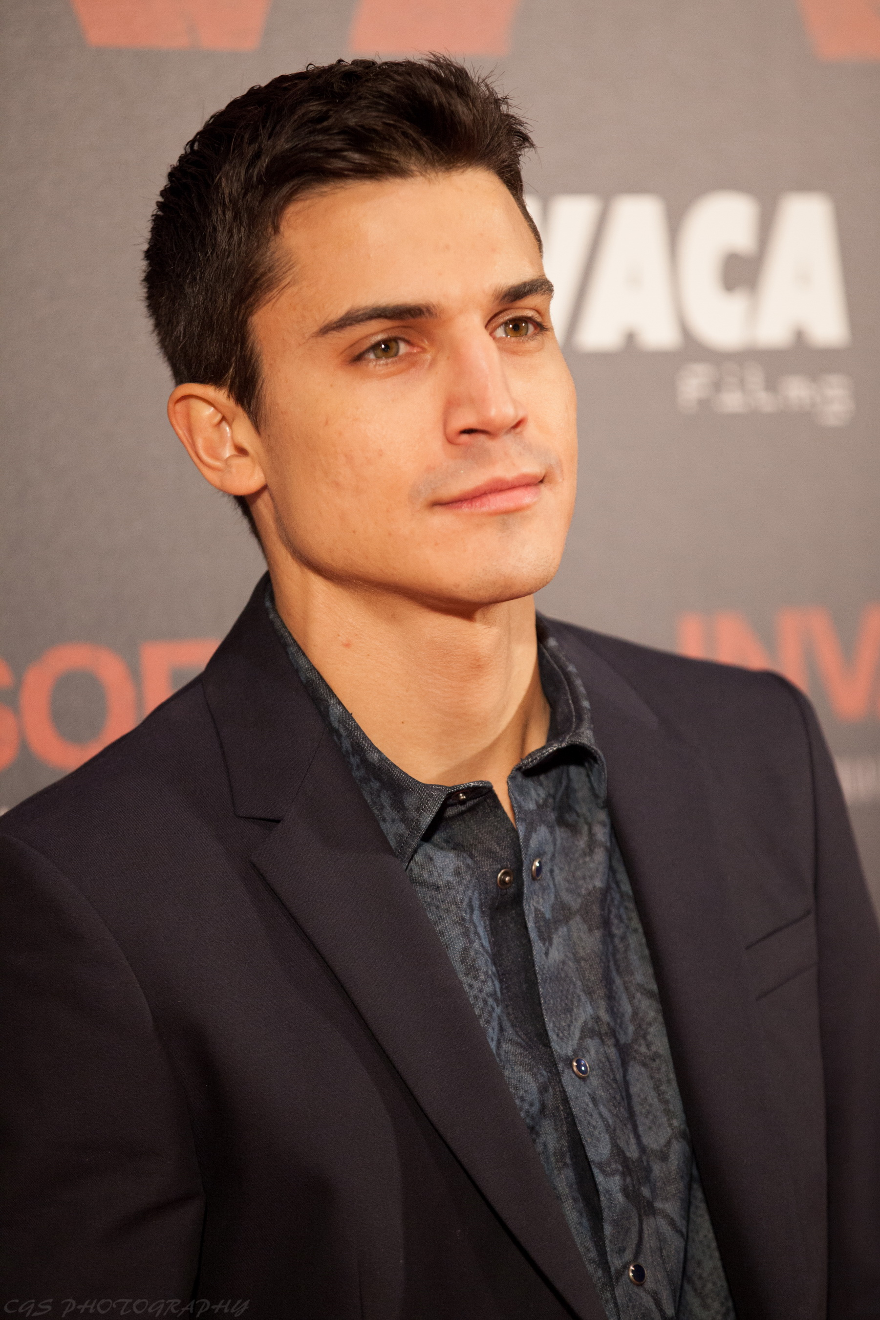 Película de Daniel Calparsoro protagonizada por Alberto Ammann, Antonio de la Torre, Inma Cuesta y Karra Elejalde.